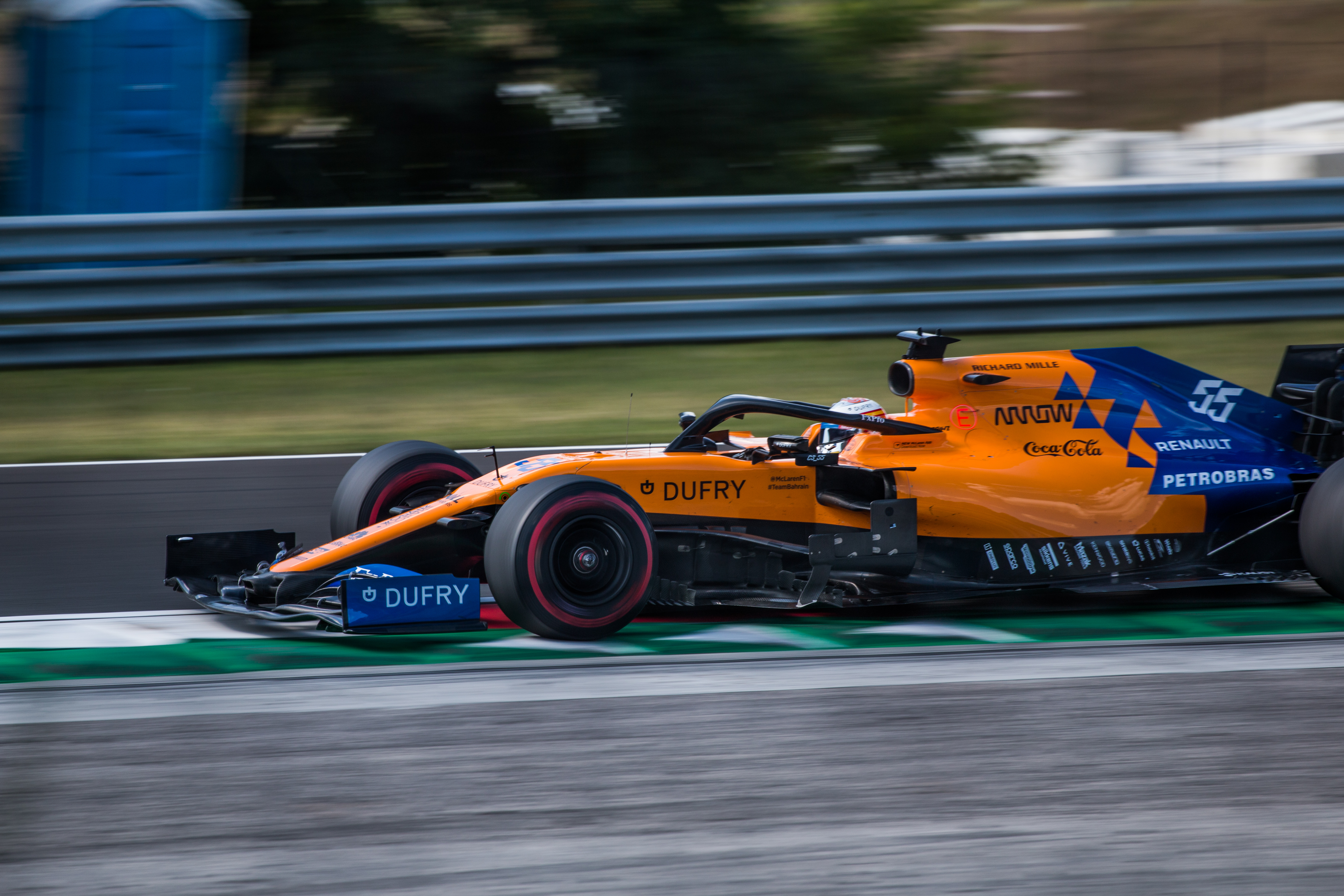 Carlos Sainz Jr. in his McLaren MCL34 during Formula 1 Hungarian Grand Prix 2019 on the Hungaroring